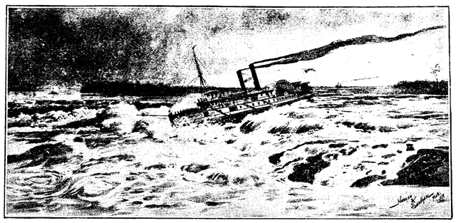 SUR LE ST. LAURENT Las Rapides de Lachine--Comme on voyage aujourd'hui....